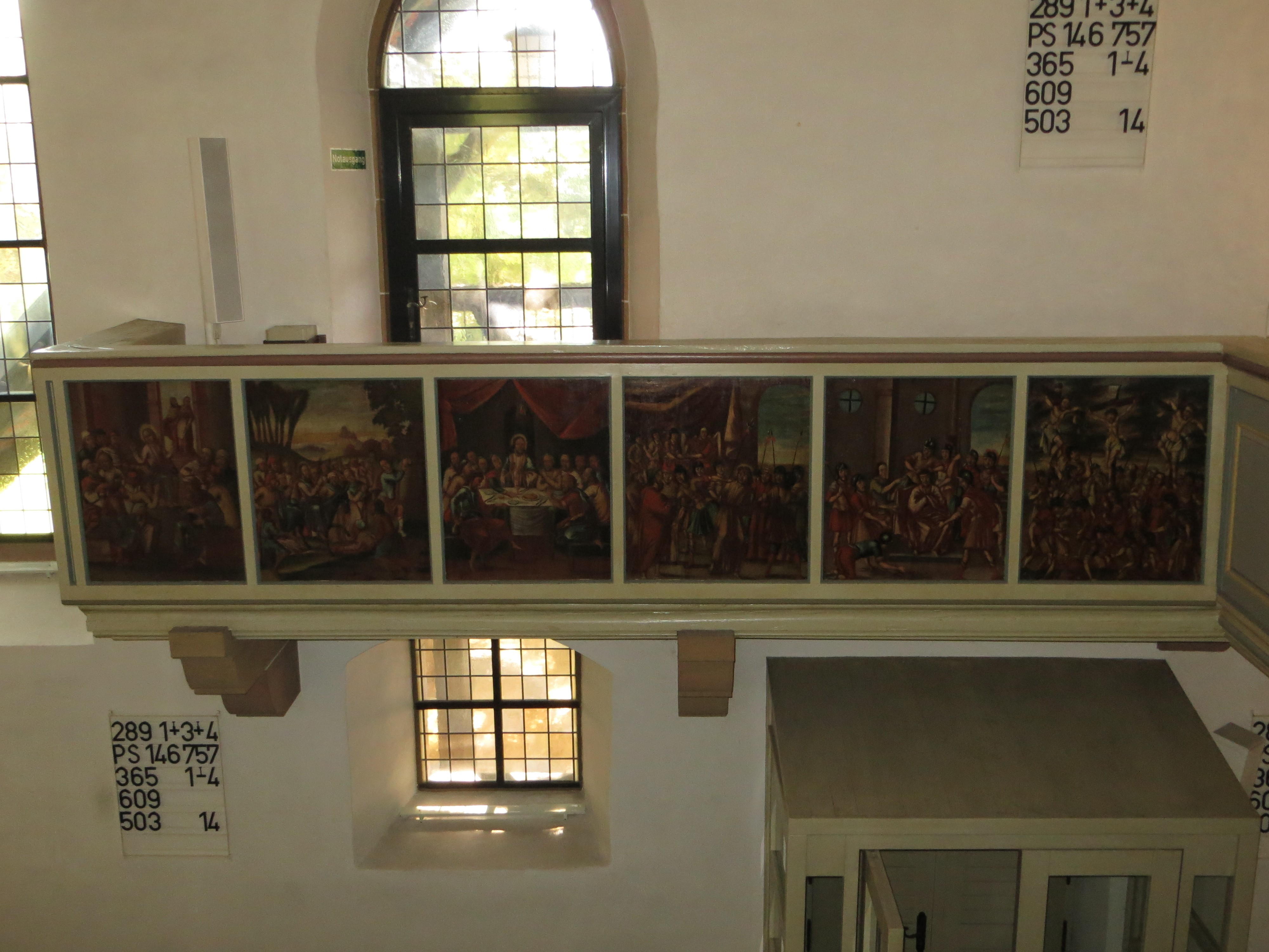 Die evangelische St.-Anna-Kirche in Beilstein. Südempore